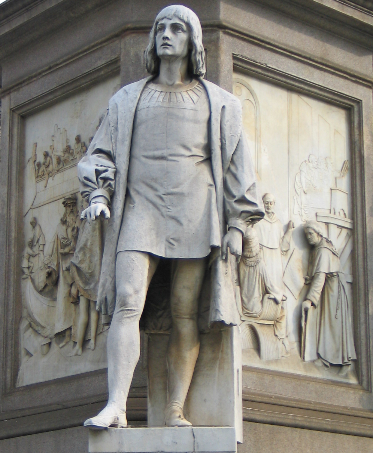 Figure of Italian painter Cesare da Sesto at the pedestal of Leonardo da Vinci monument. Milan, Piazza della Scala. Sculptor Pietro Magni. Pictured by Andrei Romanenko. June 2006.